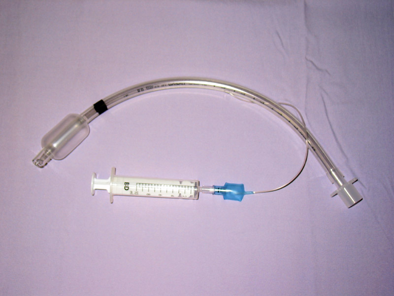 sonde d'intubation tracheale